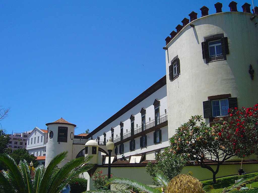 São Lourenço Fortress in Funchal, Madeira Island